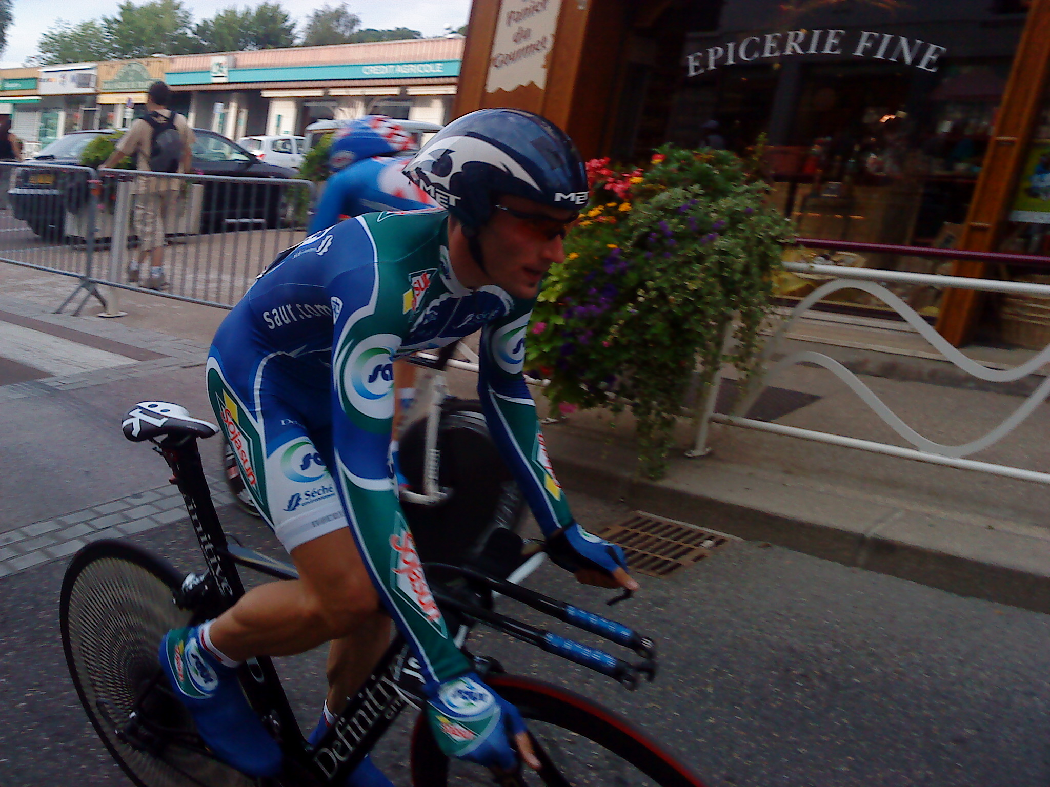 Jonathan Hivert à l'arrivée du prologue du Tour de l'Ain 2010